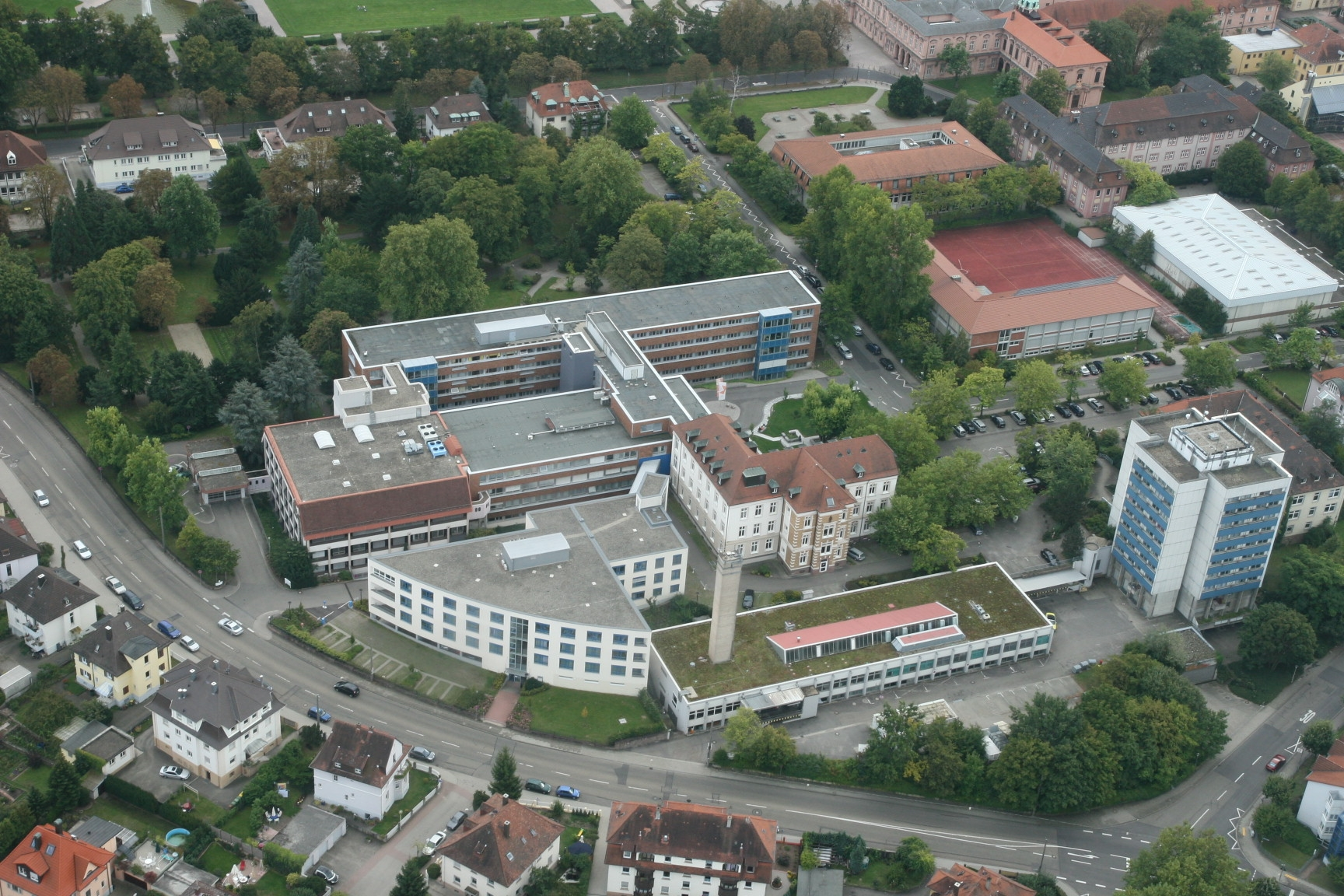 Luftaufnahme des Kreiskrankenhauses Rastatt, einer Klinik des Klinikums Mittelbaden.